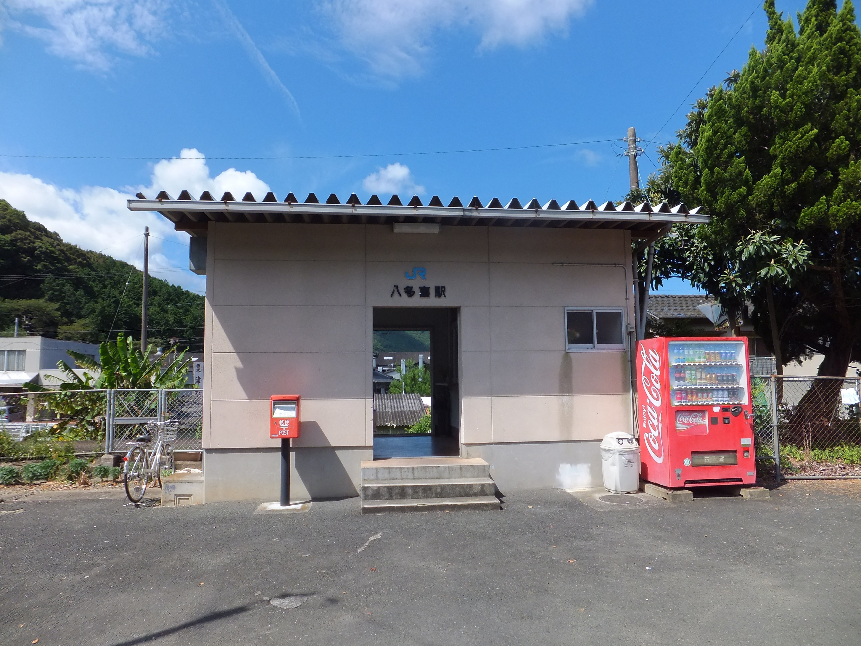 愛媛県大洲市 JR四国 予讃線 八多喜駅